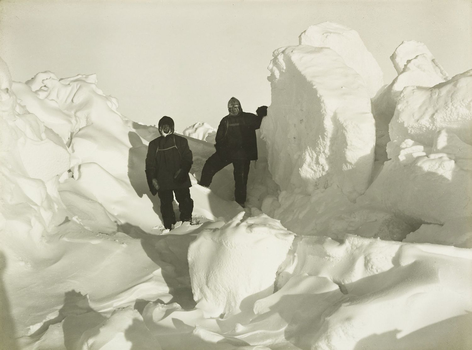 Frank Wild et Ernest Shackleton sur le pack